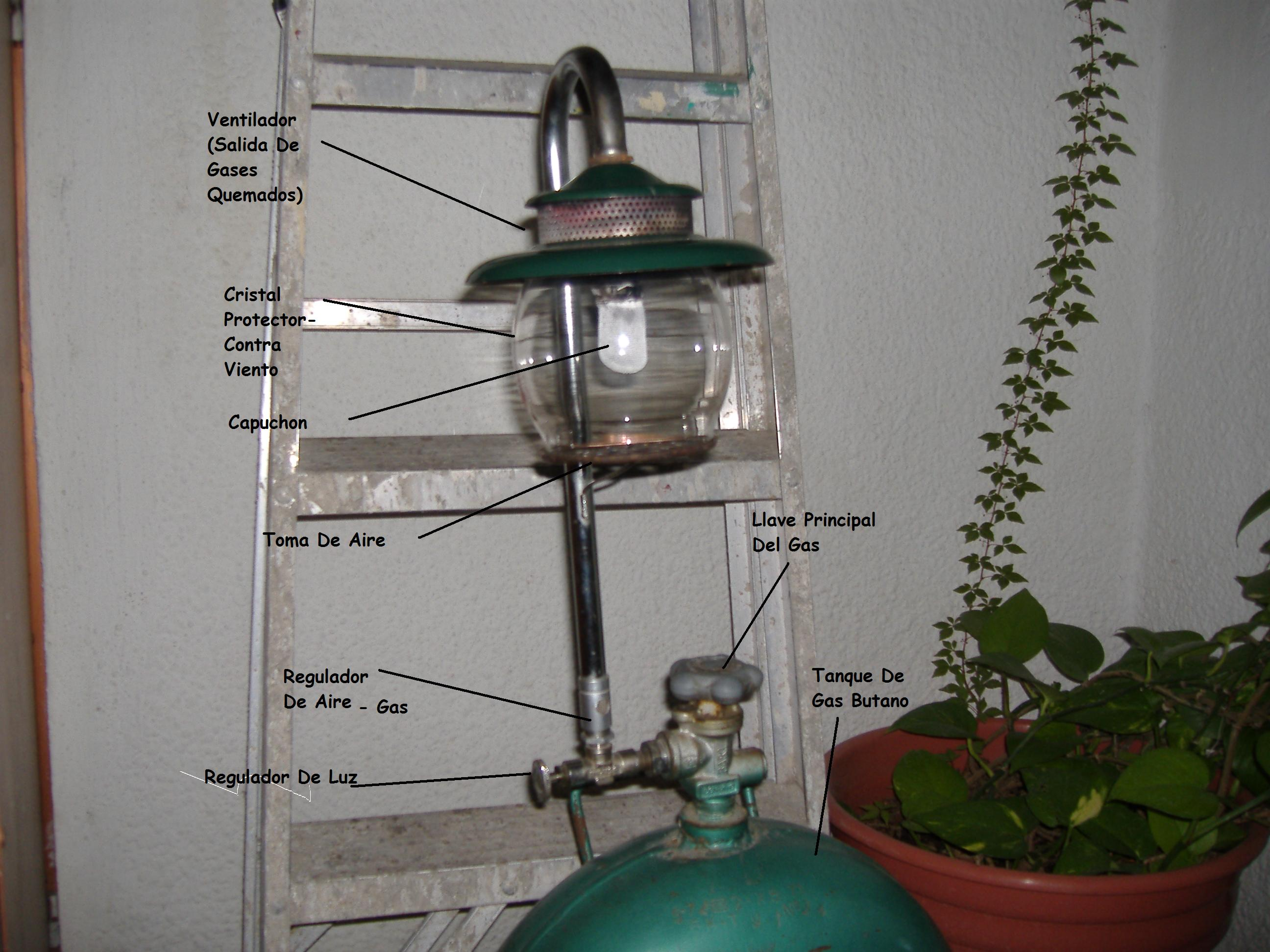 Esta es una lámpara de gas butano de un solo capuchón Partes: En La Imagen